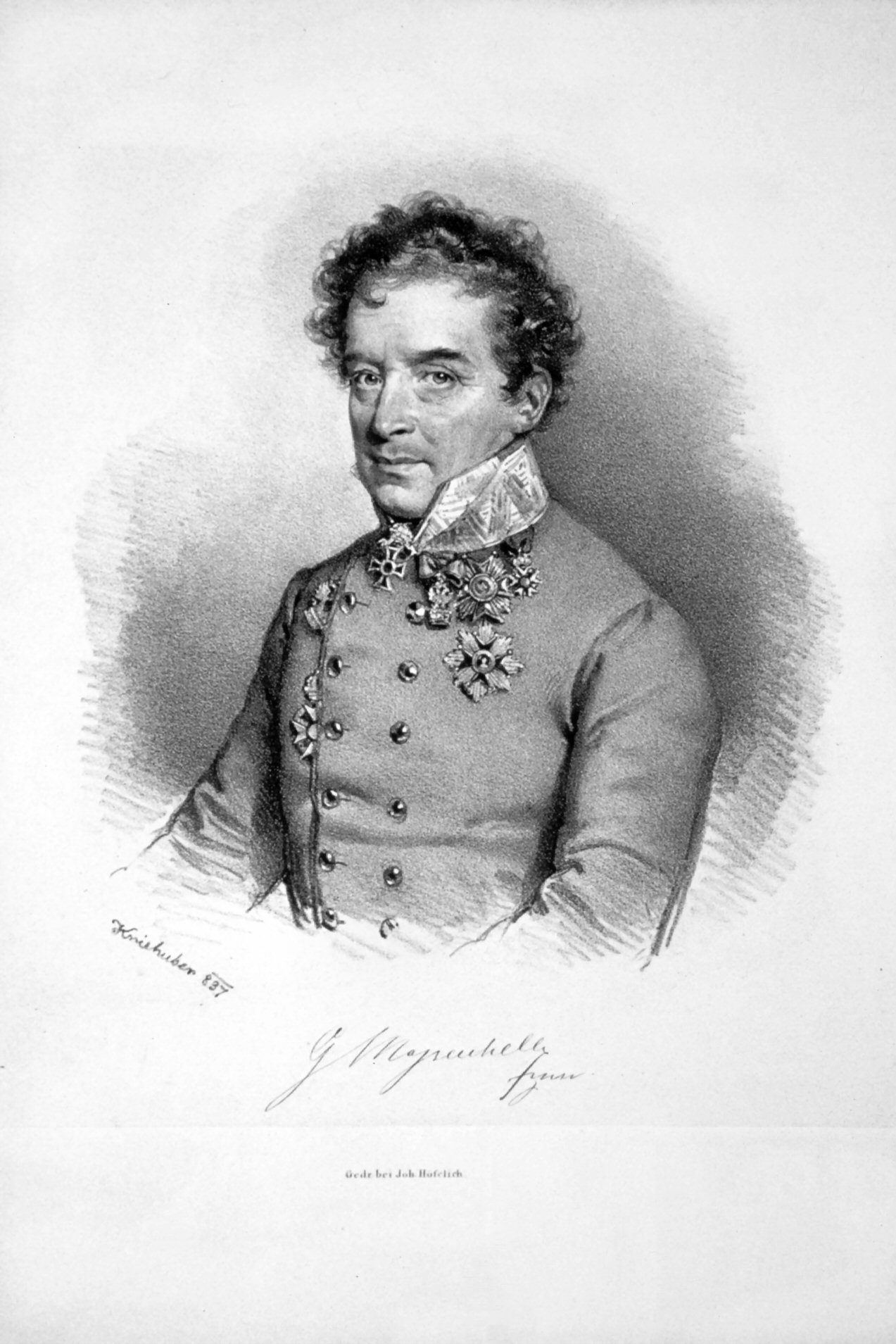 Alois Graf Mazzuchelli (1776-1868), Hofkriegsrat, Feldzeugmeister, Festungskommandant von Mantua.